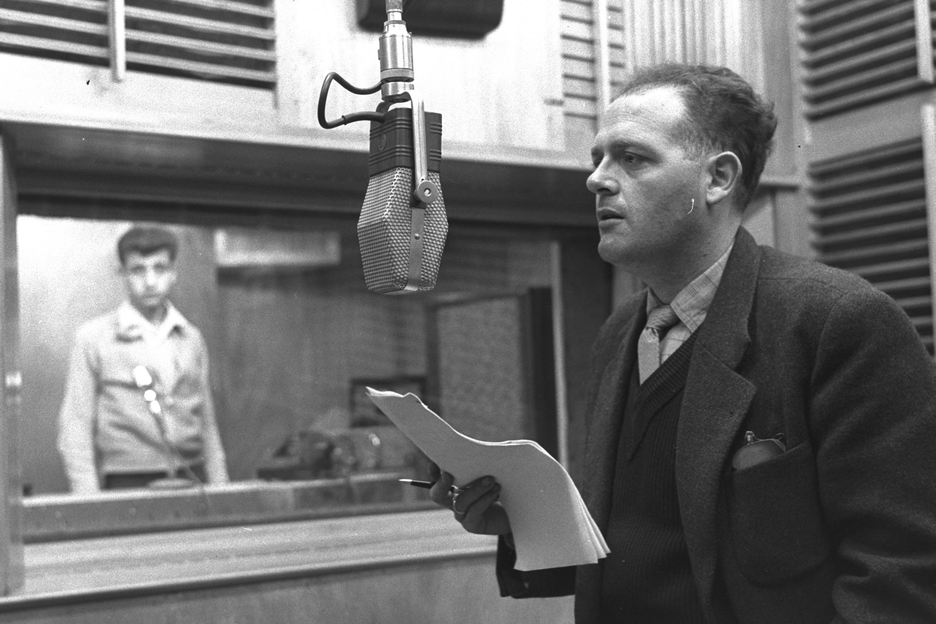 אלימלך רם, עורך תכניות בקול ישראל